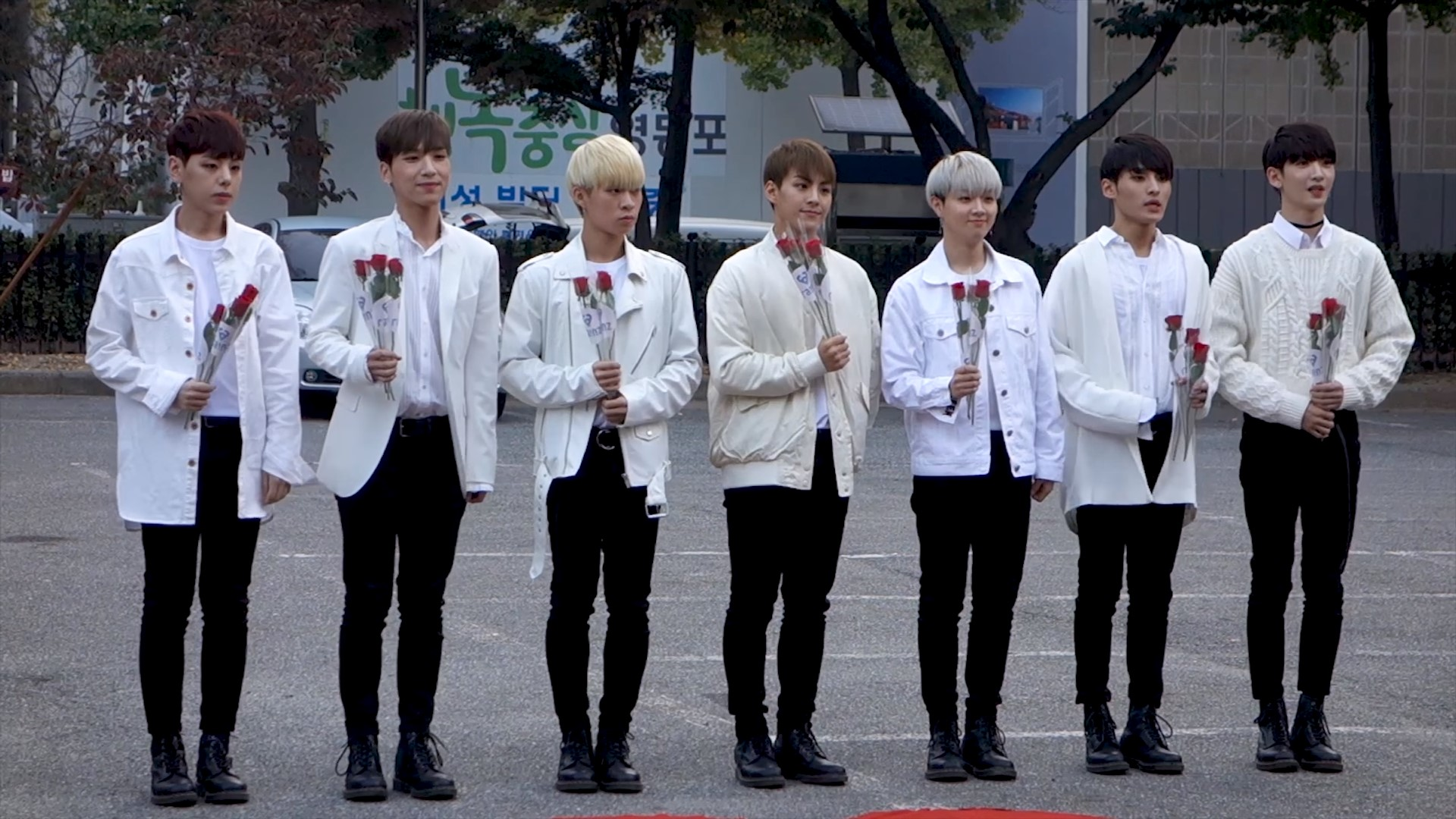 171027 레인즈 KBS 뮤직뱅크 출근길